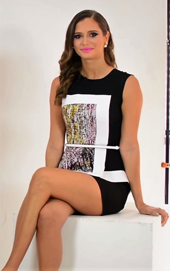 Maria Fernanda Cornejo - Top model Made in Ecuador El mundo de la moda y el modelaje la ha vuelto en una glamour fantástico. Y cuando digo fantástico no me refiero solo a "oropel". ¡No! María Fernanda Cornejo nos confiesa como es su vida de modelo internacional.